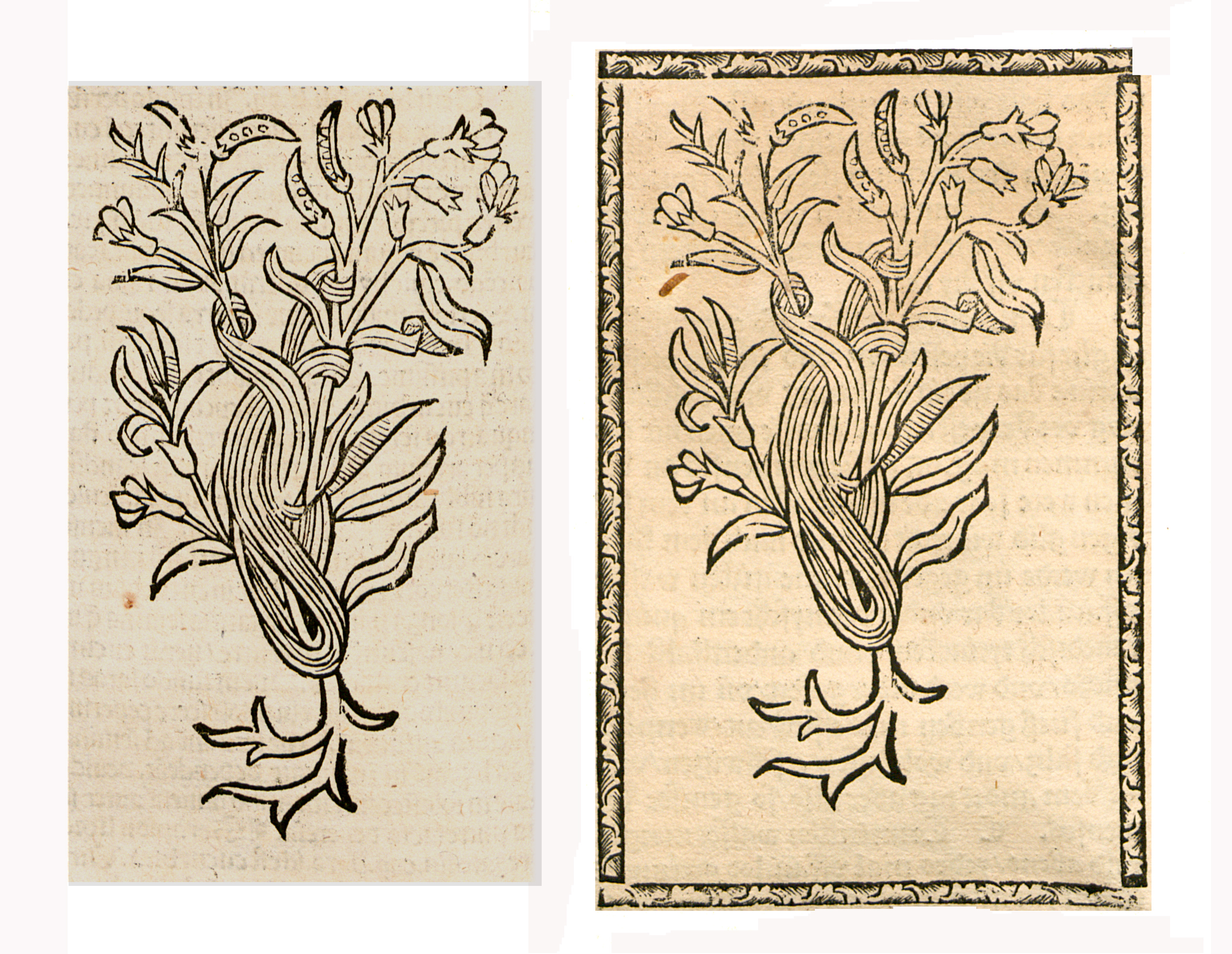 Abbildung vonː Totter (Cuscuta spec.)